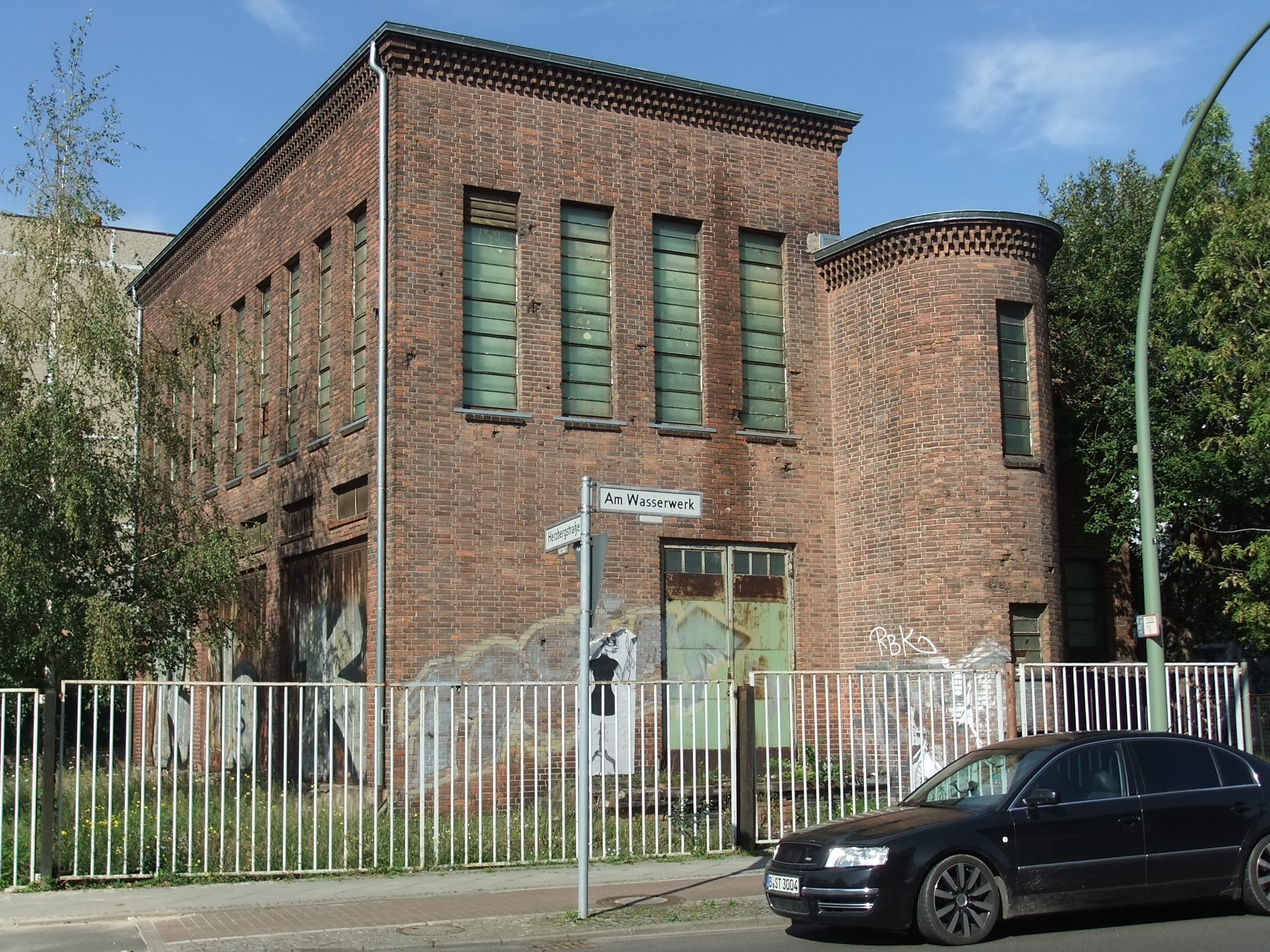 Denkmalliste Berlin 09040309 - Berlin Lichtenberg Herzbergstraße 111, Am Wasserwerk Gleichrichter- und Umspannwerk, 1928 von Hans Heinrich Müller (Baudenkmal)